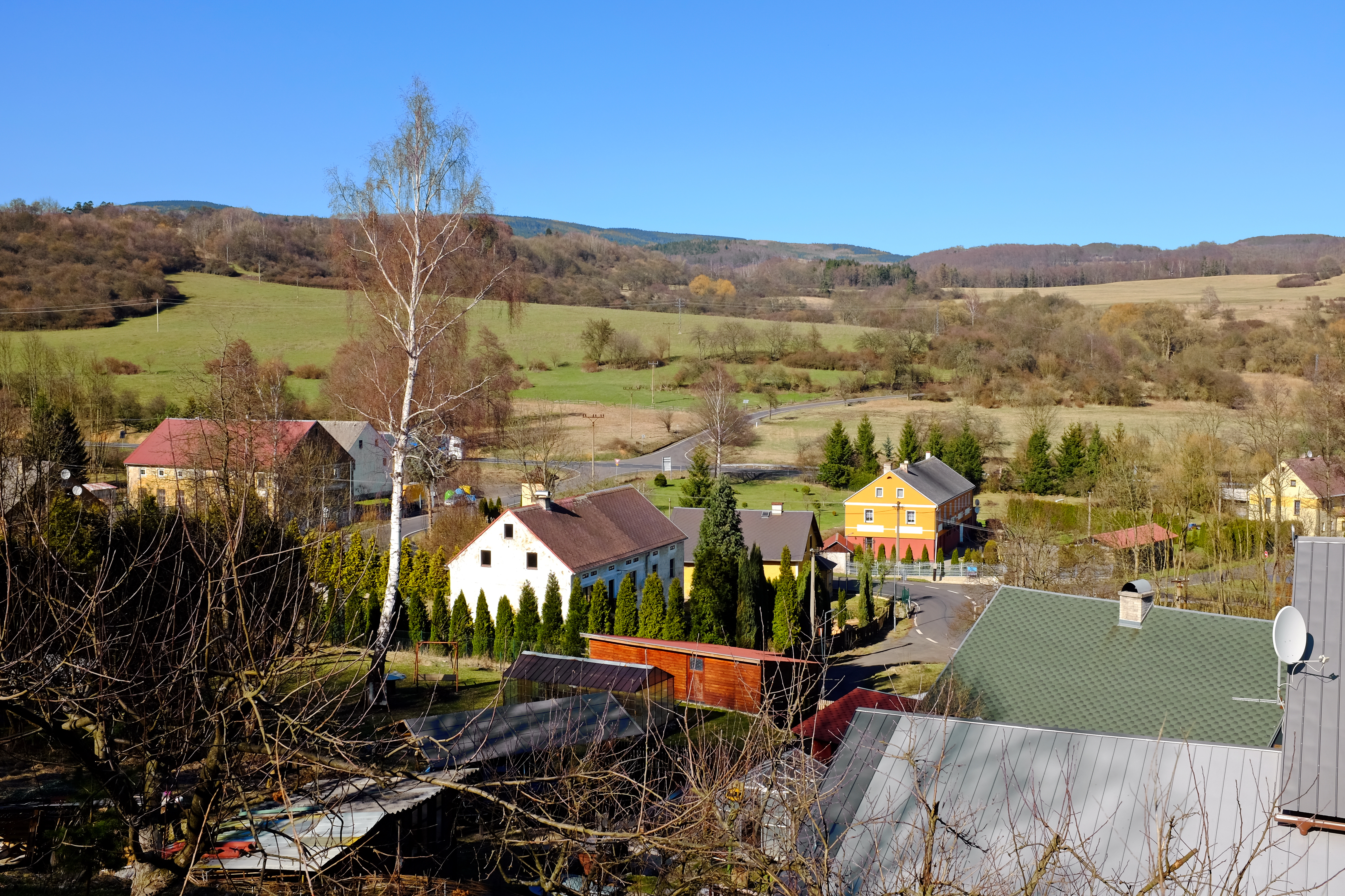 Damice, část obce Krásný Les, okres Karlovy Vary